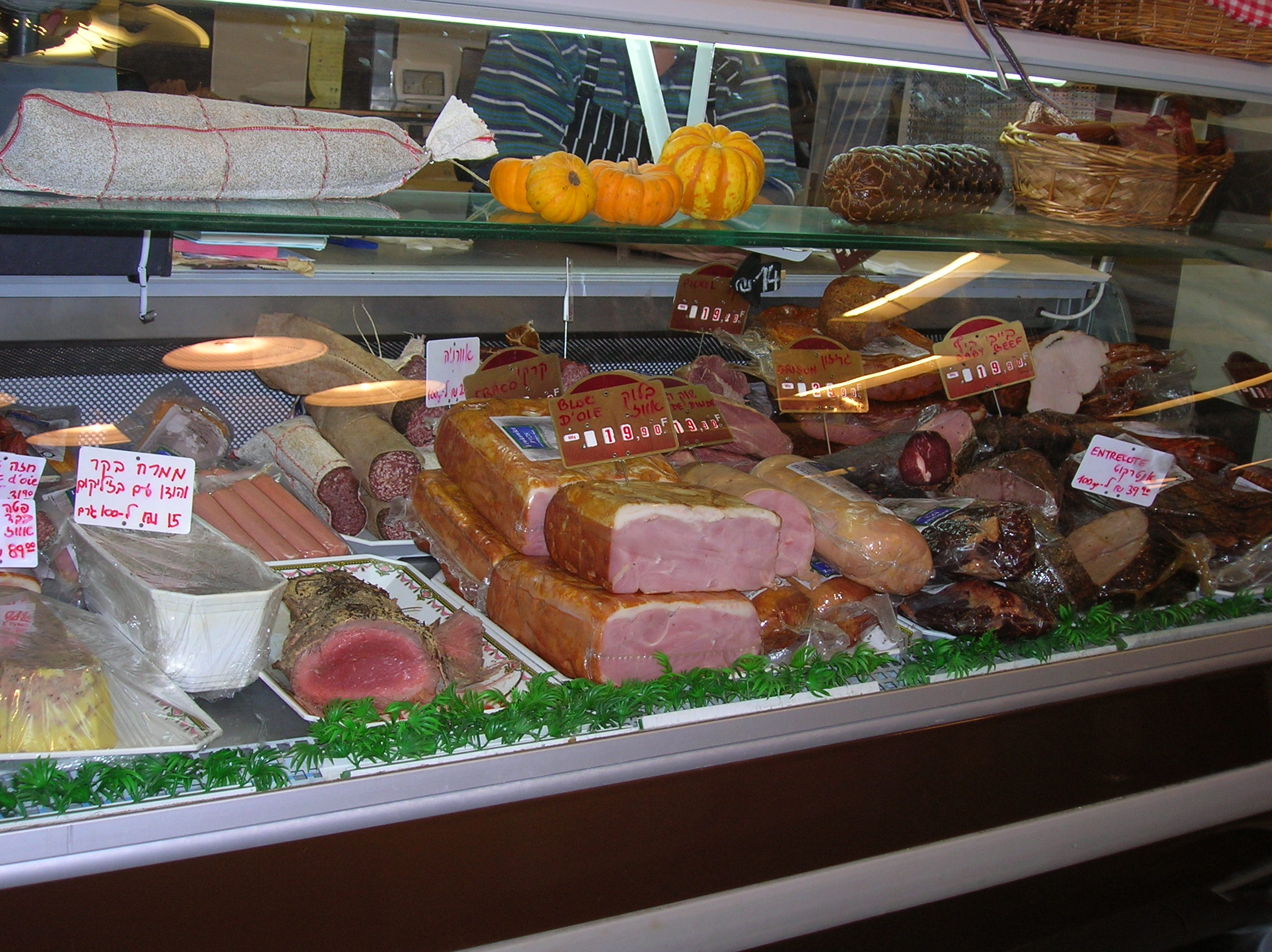 שוק הנמל 26